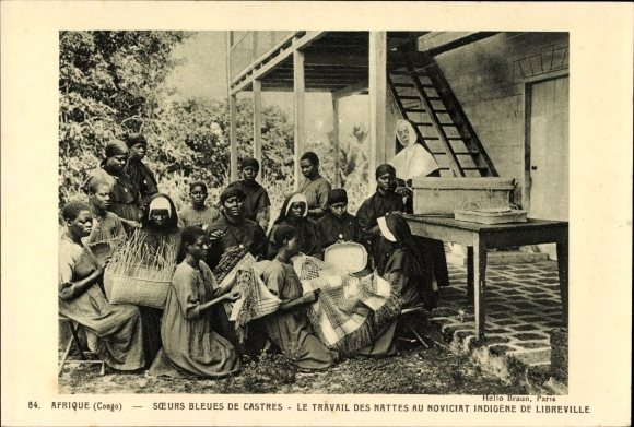 Noviciat indigène de Libreville tenu par les religieuses missionnaires de Notre Dame de l'Immaculée Conception de Castres. Vers 1930.